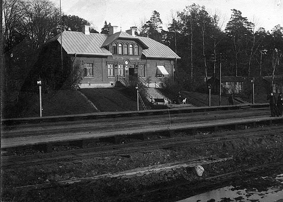 Tomteboda_station 1902. Byggnadsår 1882. Arkitekt Adolf Vilhelm Edelsvärd